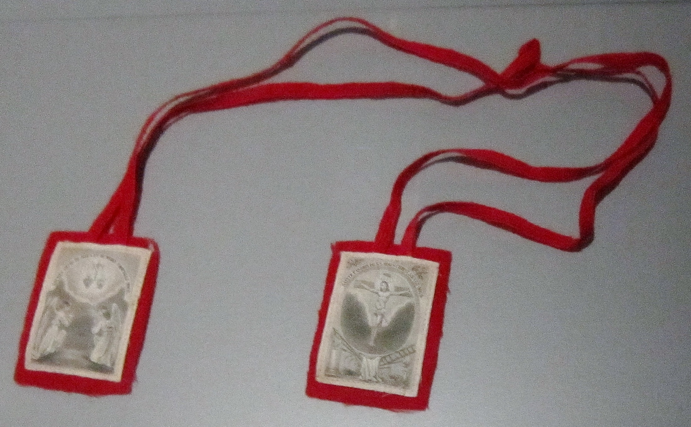 Scapulaire avec l'image du cœur de Jésus. Cousu au revers d'une veste ou à l'intérieur d'un bonnet, ou porté directement sur le corps, le scapulaire est supposé protéger du mal en général, et notamment des sortilèges (Musée de Bretagne, Rennes).